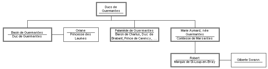 Généalogie des ducs de Guermantes. Contribution personnelle Jean-Claude Duss